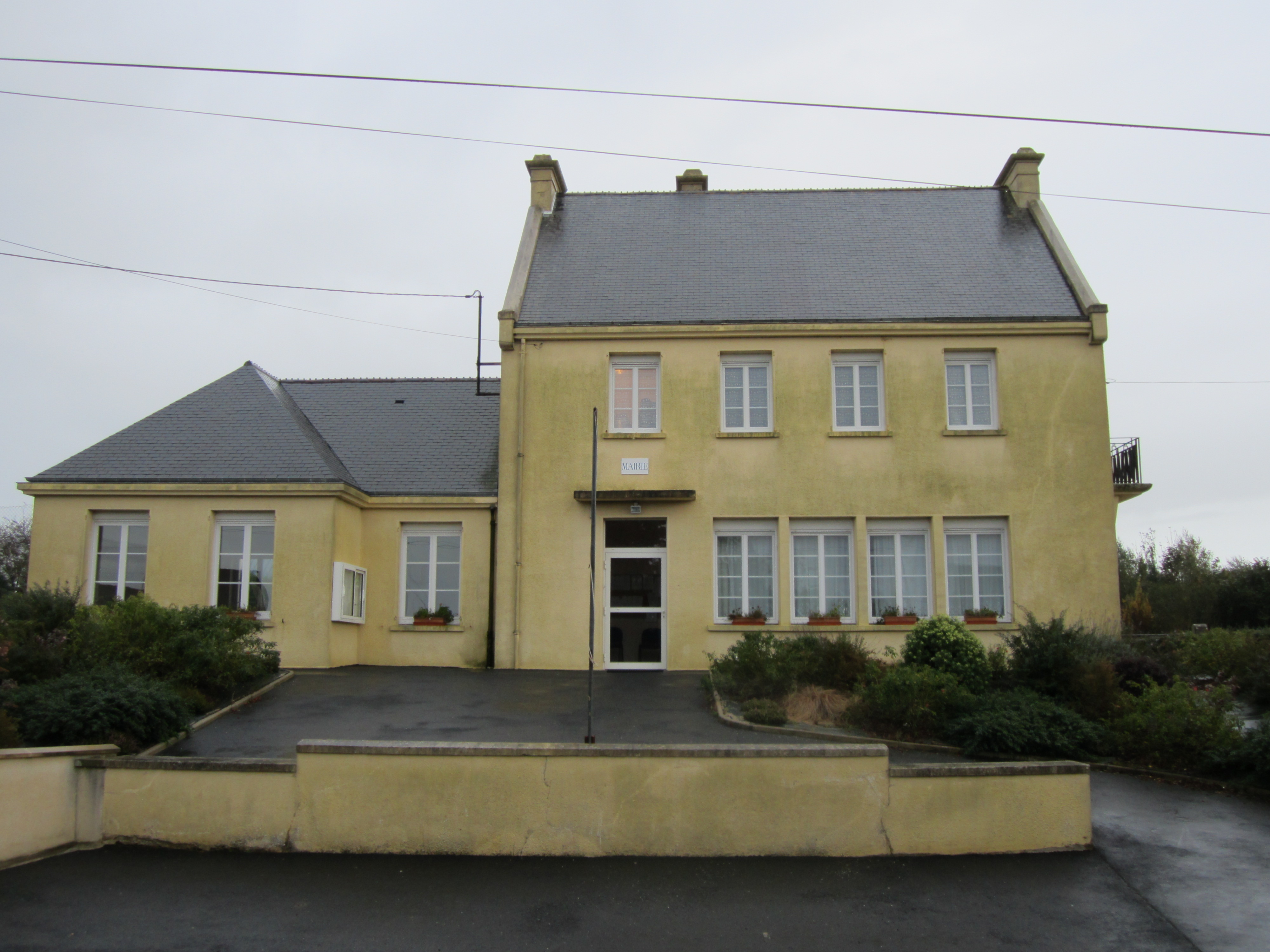 Église Notre-Dame d'Éroudeville